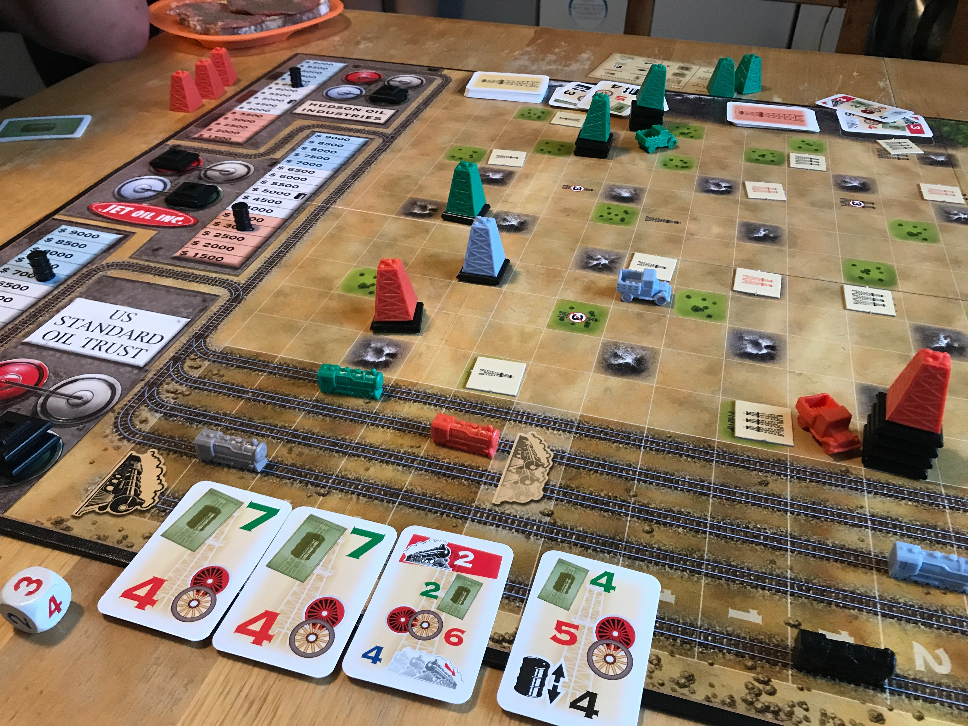 Spielmaterial des Brettspiels Giganten (1999)